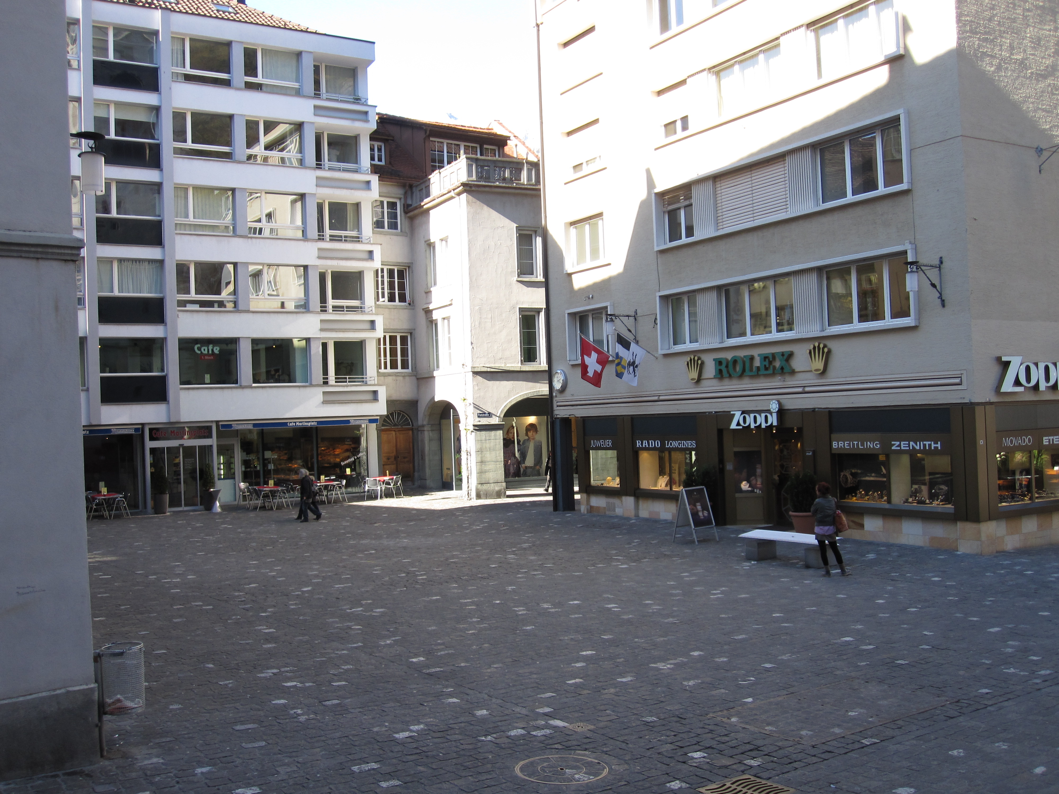 Martinsplatz in Chur (Schweiz, Kanton Graubünden)